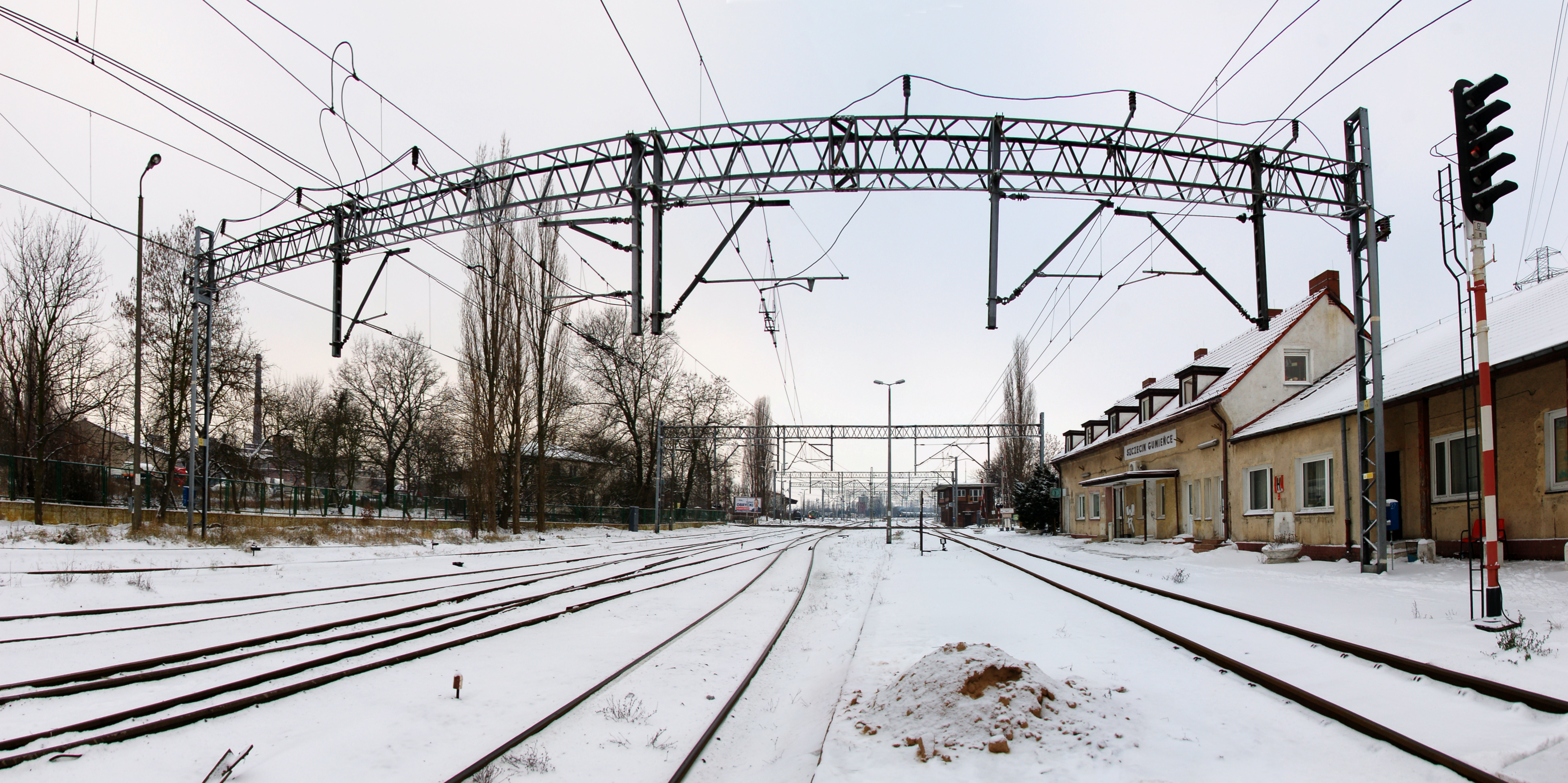 Stacja kolejowa Szczecin Gumieńce